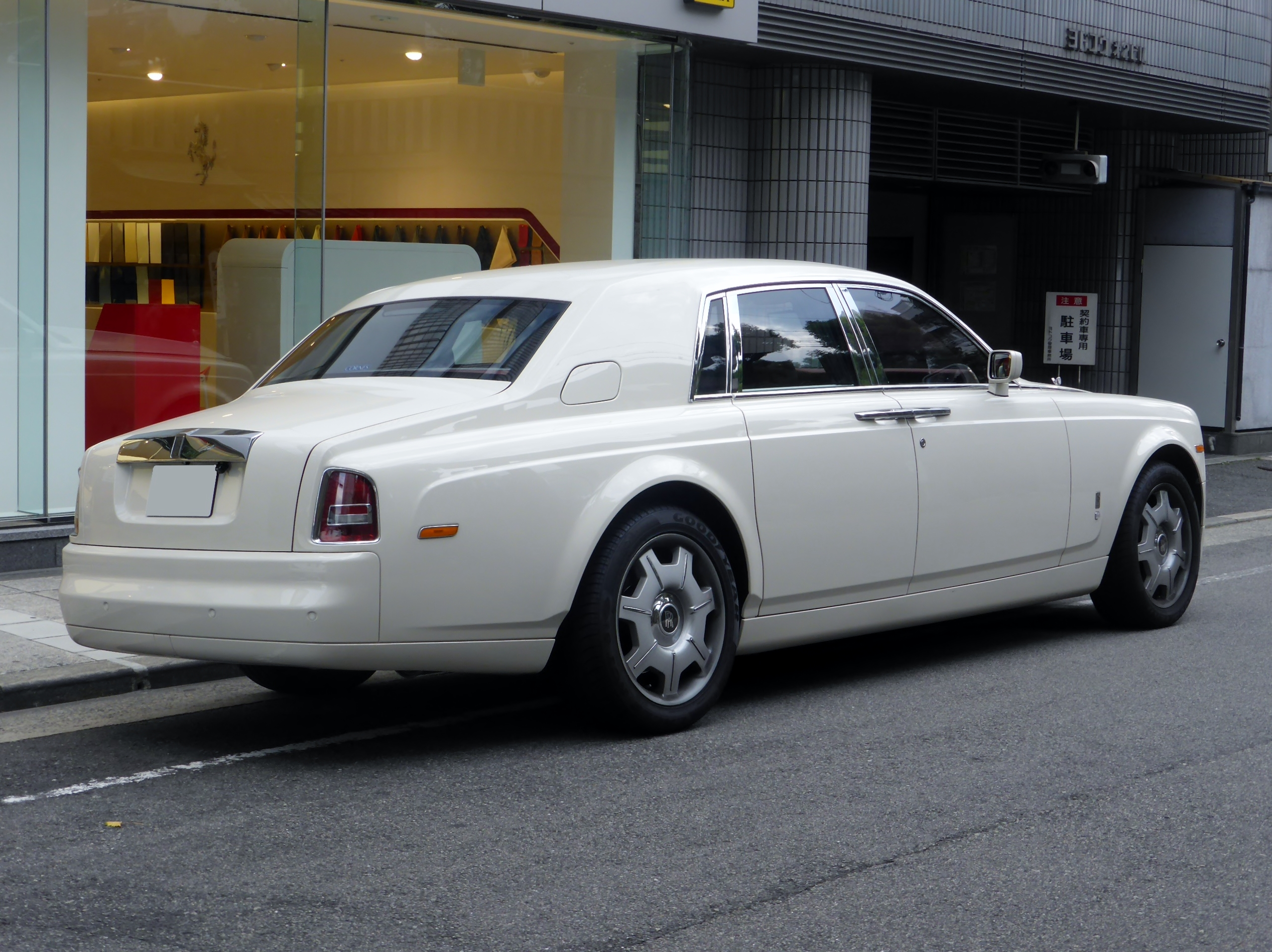 ロールスロイス・ファントムシリーズIをリアから撮影。